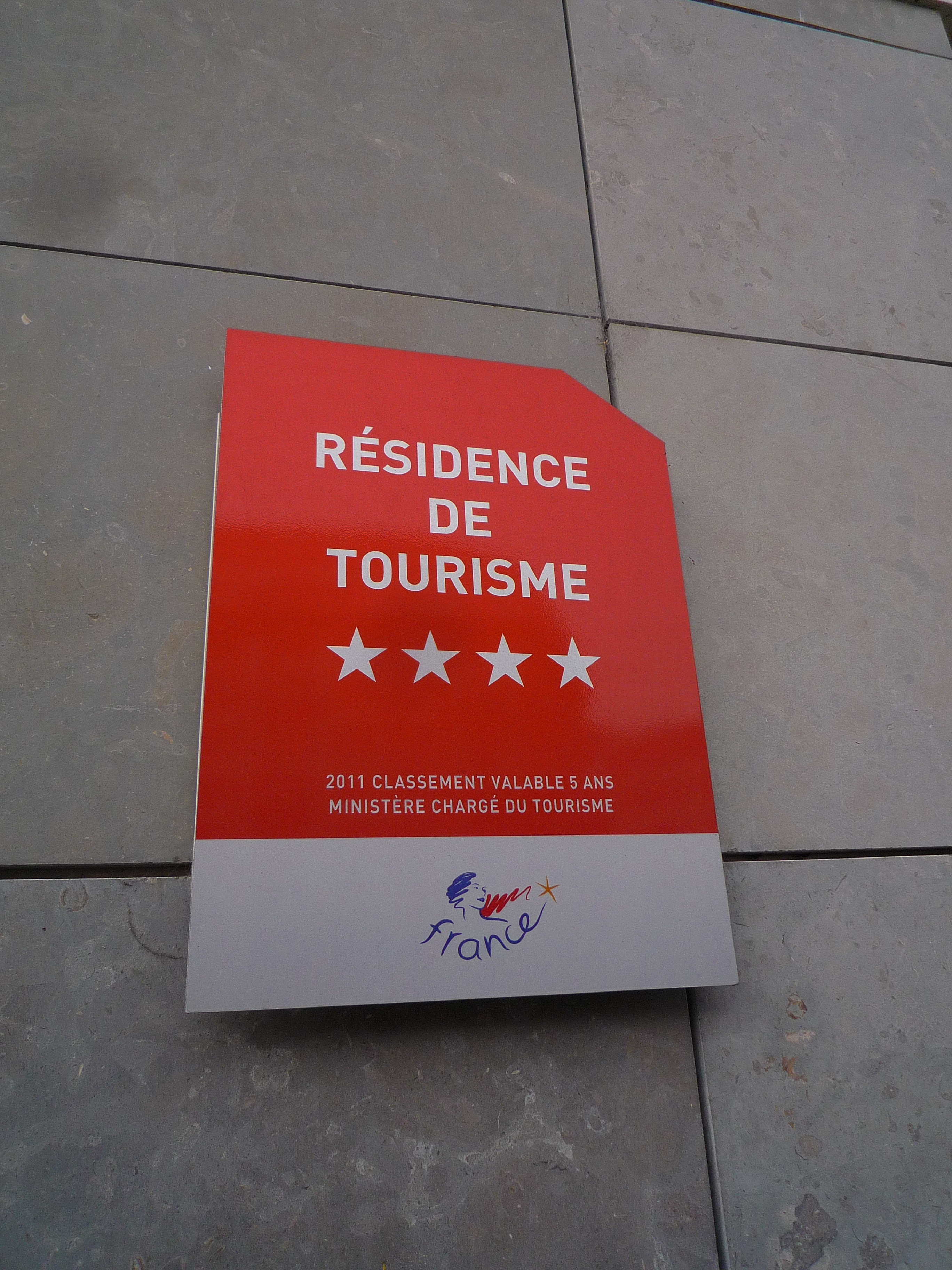 France Signalétique Résidence de tourisme 4 étoiles